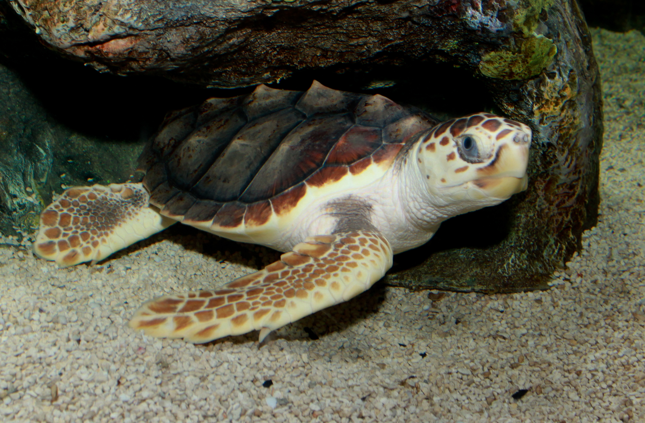 Loggerhead Sea Turtle (Caretta caretta)